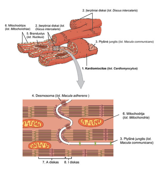 Kardiomiocito sandara